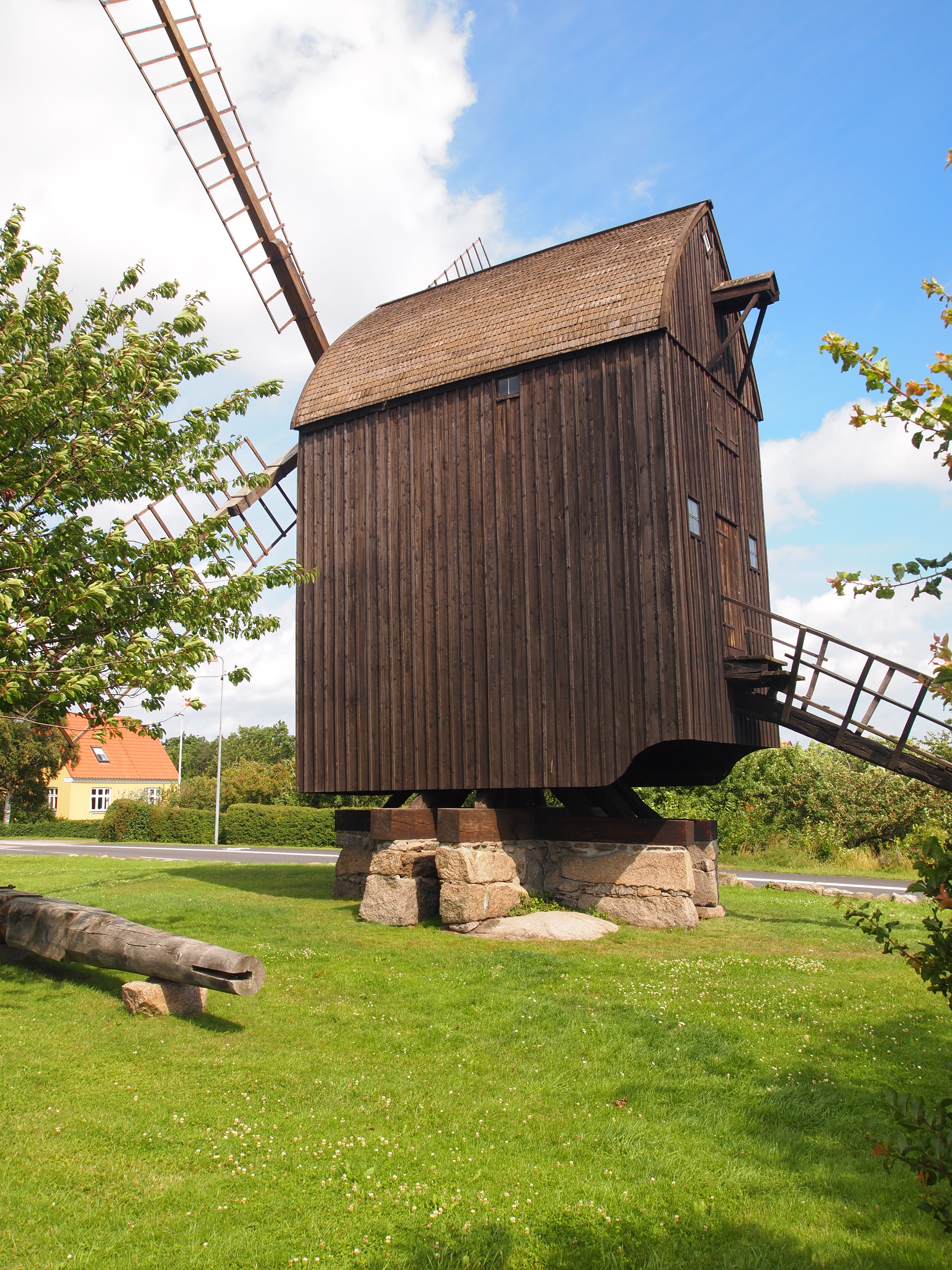 Bechs Mølle in Svaneke, Bornholm, Denmark